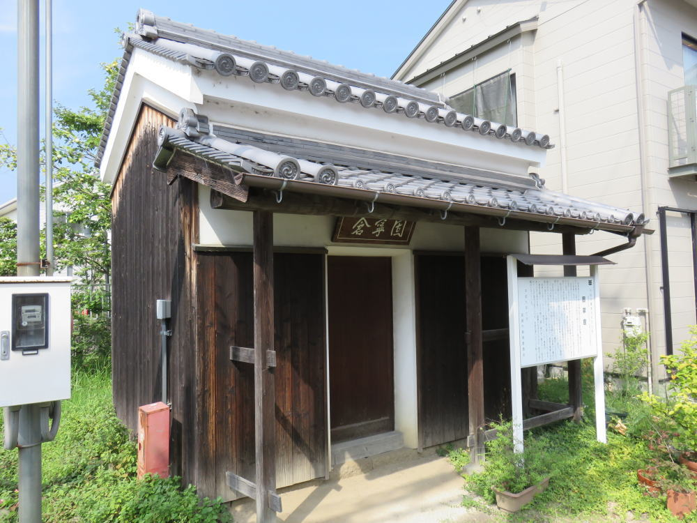 姫路市野里慶雲寺前にある固寧倉